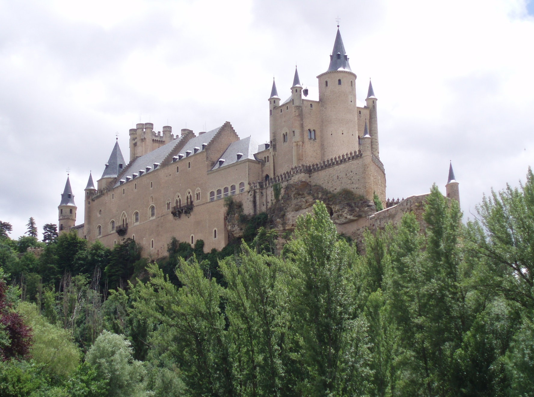 Alcázar de Segovia (España).